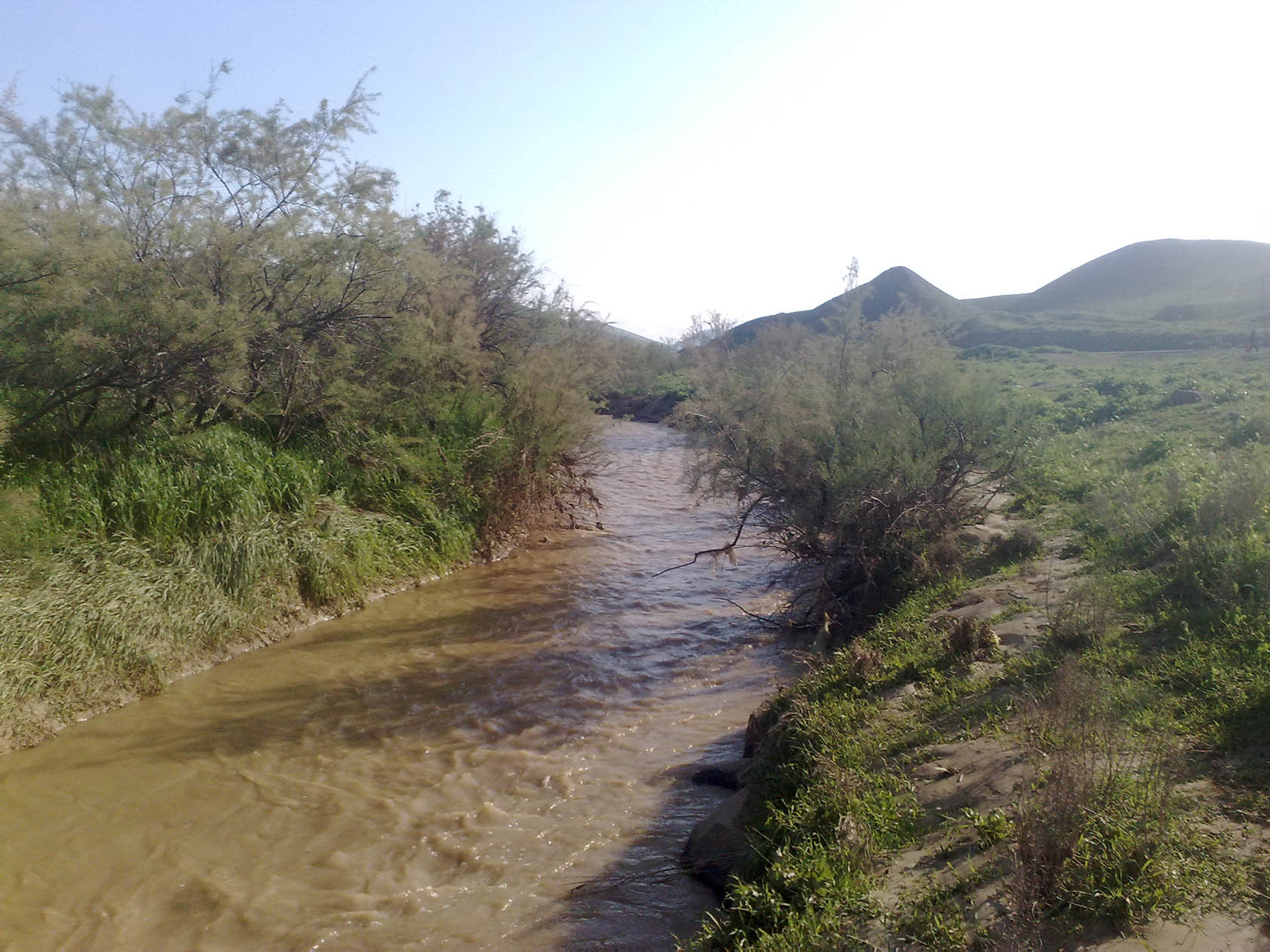 روستای اودلو